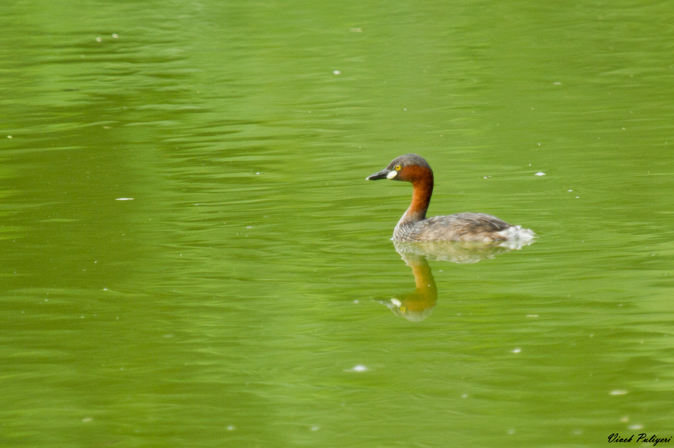 Little Grebe @ IITM